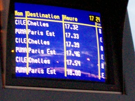 Horaires de grève